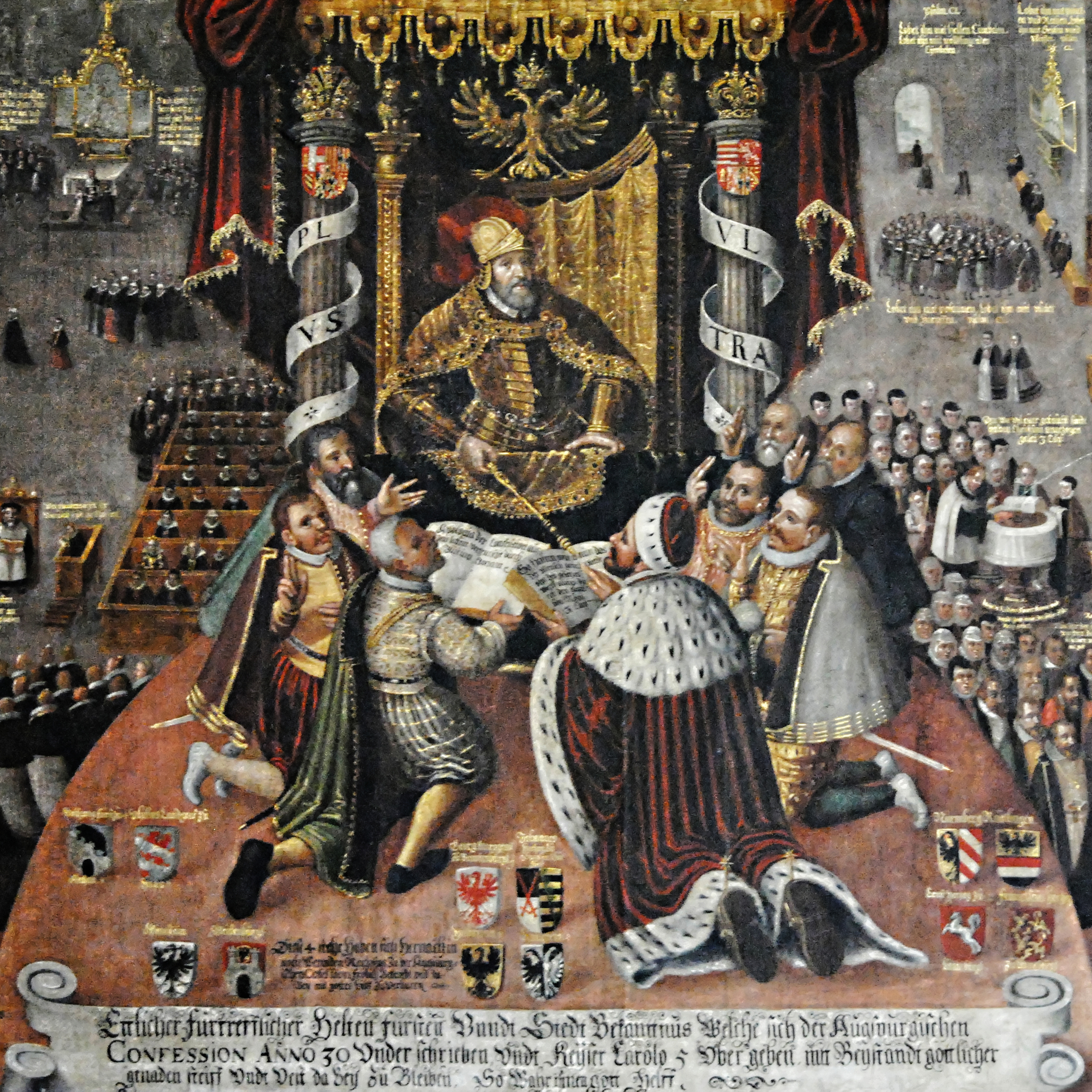 Bildmitte des Konfessionsbilds „Überreichung der Confessio Augustana“, St. Johannis, Schweinfurt